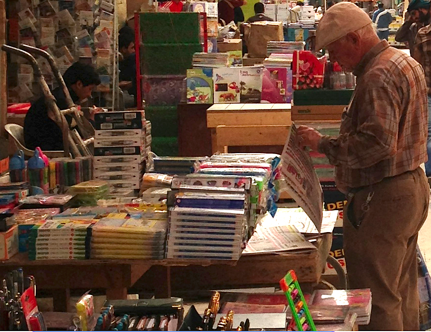 Man reading, Baghdad, 2013